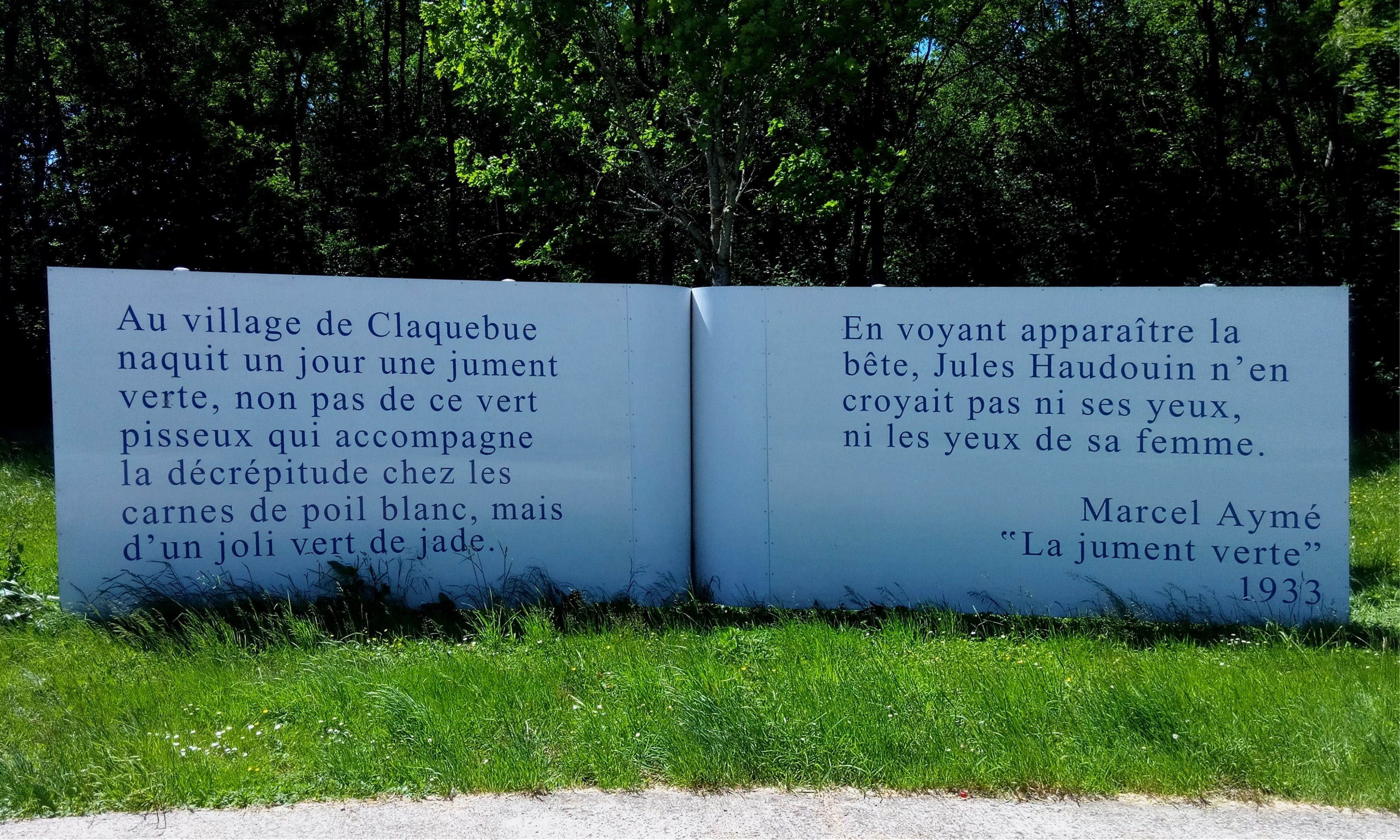 Aire de repos de la Jument Verte, sur l'A39, Colonne, Jura, France.